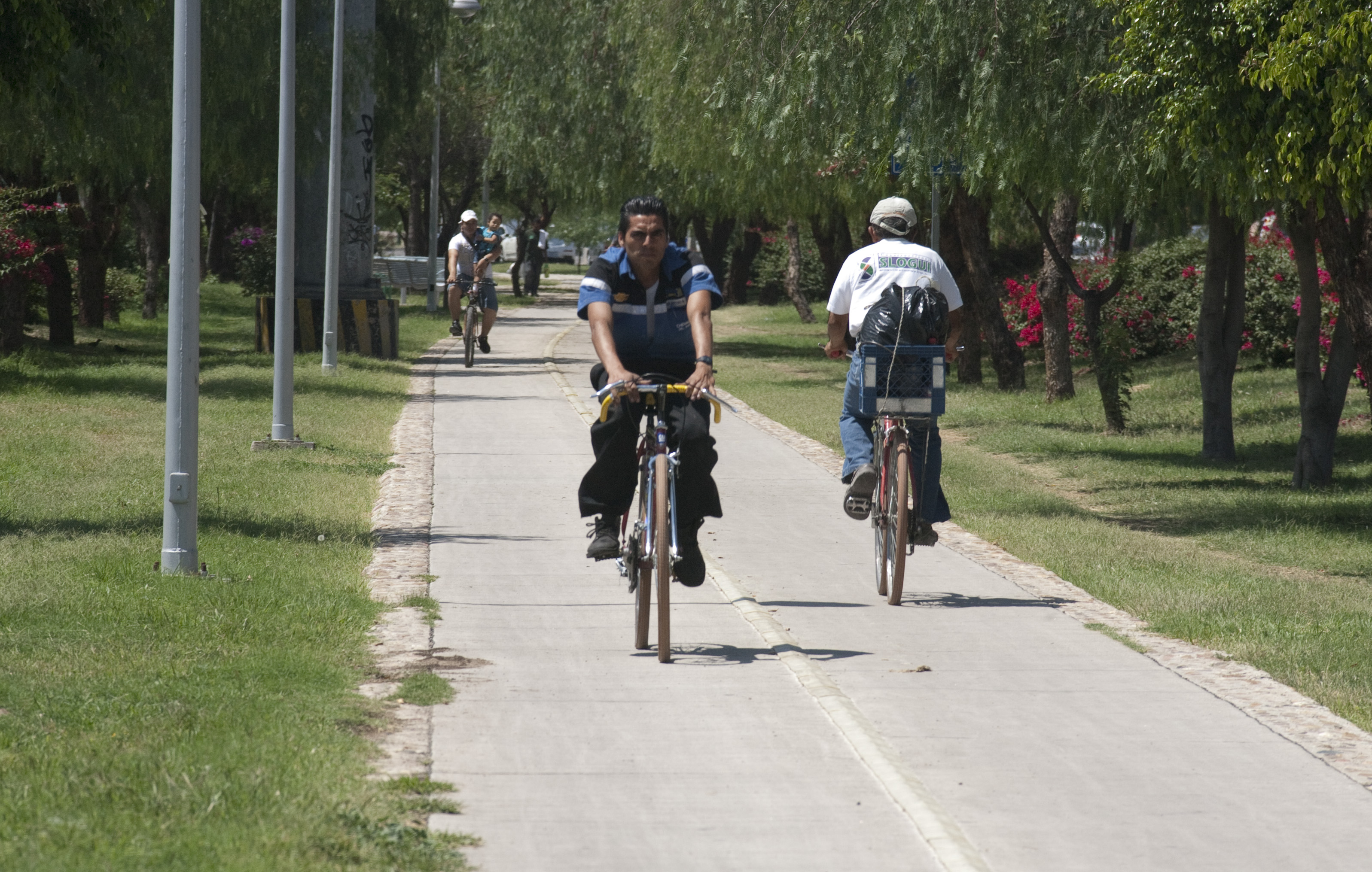 Ciclovias de la ciudad de León conforman un cicloférico .